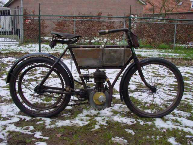 Toestemming van Yesterdays Antique Motorcycles (